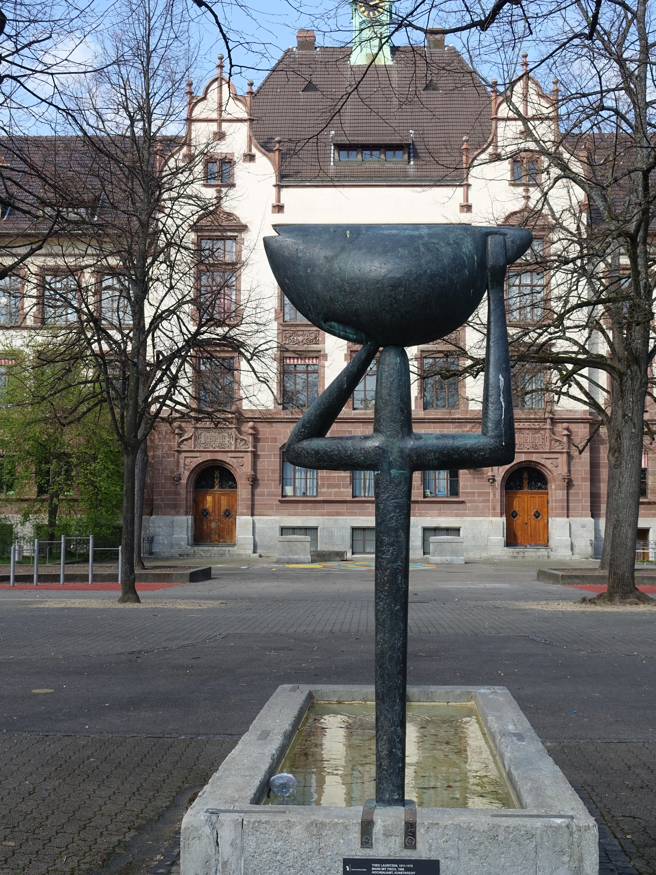 Brunnenplastik, Mann mit Fisch, 1966, Gotthelfschulhaus Basel. Von Theo Lauritzen (1911-1978) Plastiker, Zeichner